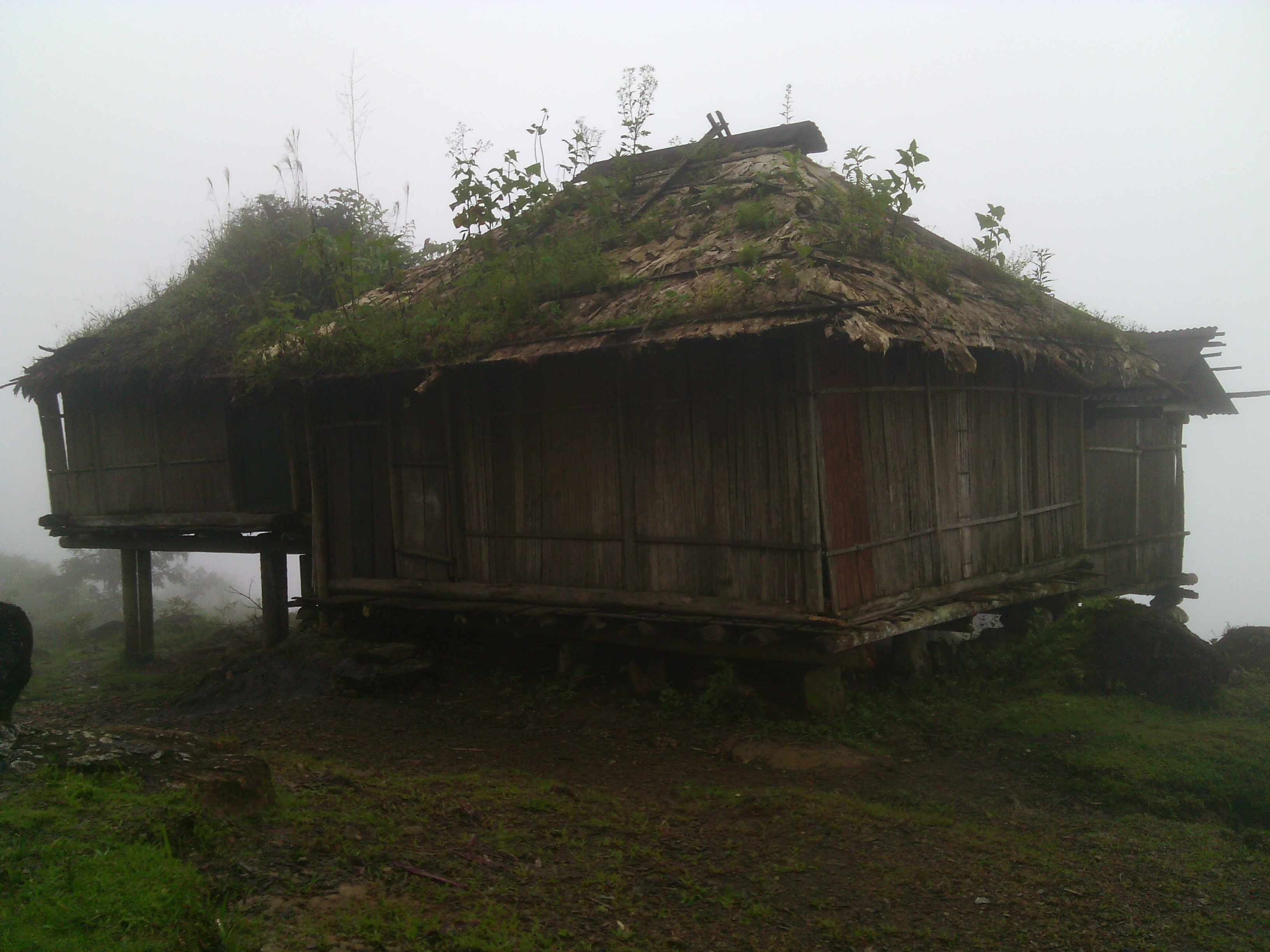 esta imagen representa nuestro modelo de construcción etnica